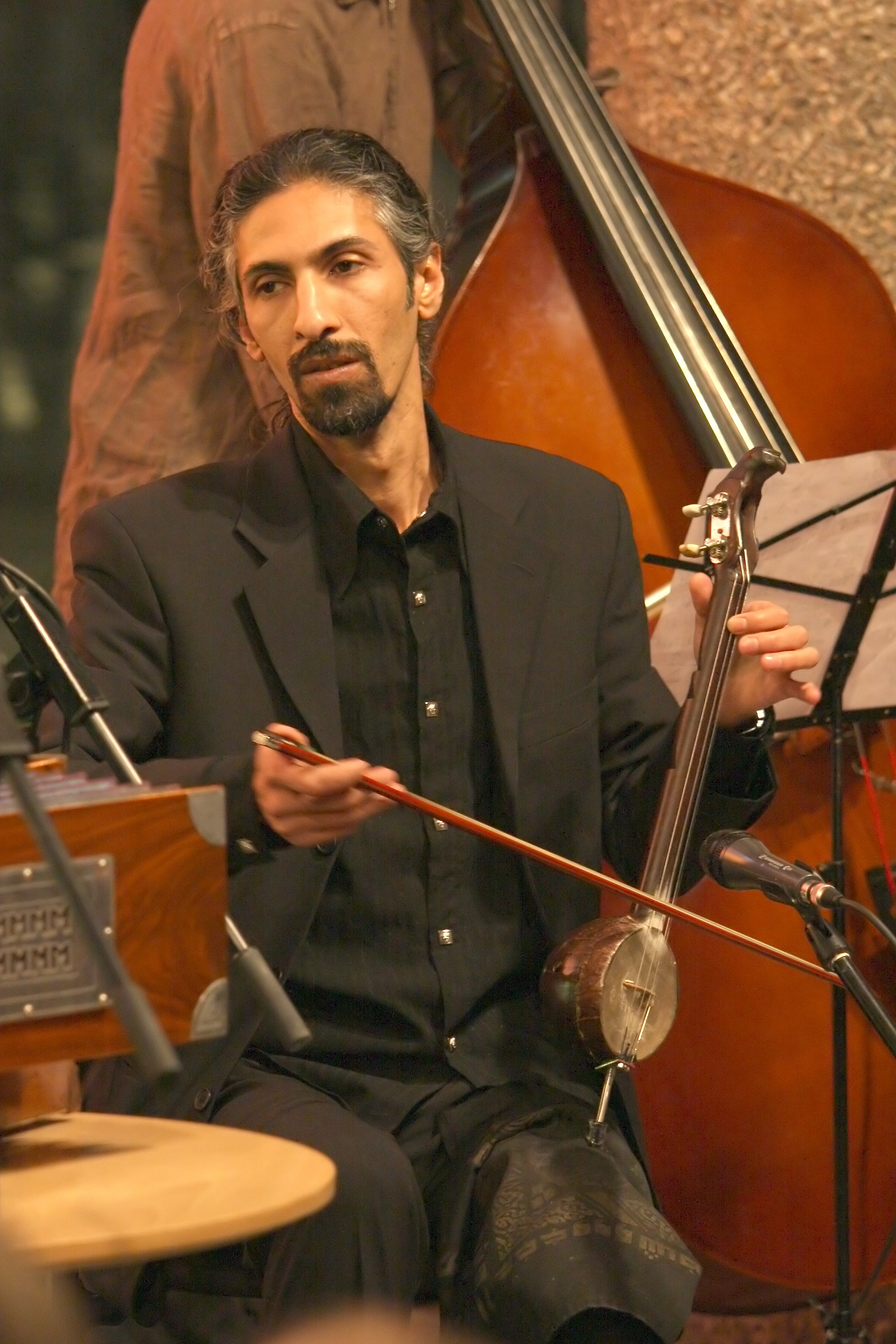 Bassem Hawar spielt die Djoze [1]. Gastauftritt zusammen mit Mariana Sadovska und ihrer Gruppe „Borderland“. Auftritt im Domform Köln